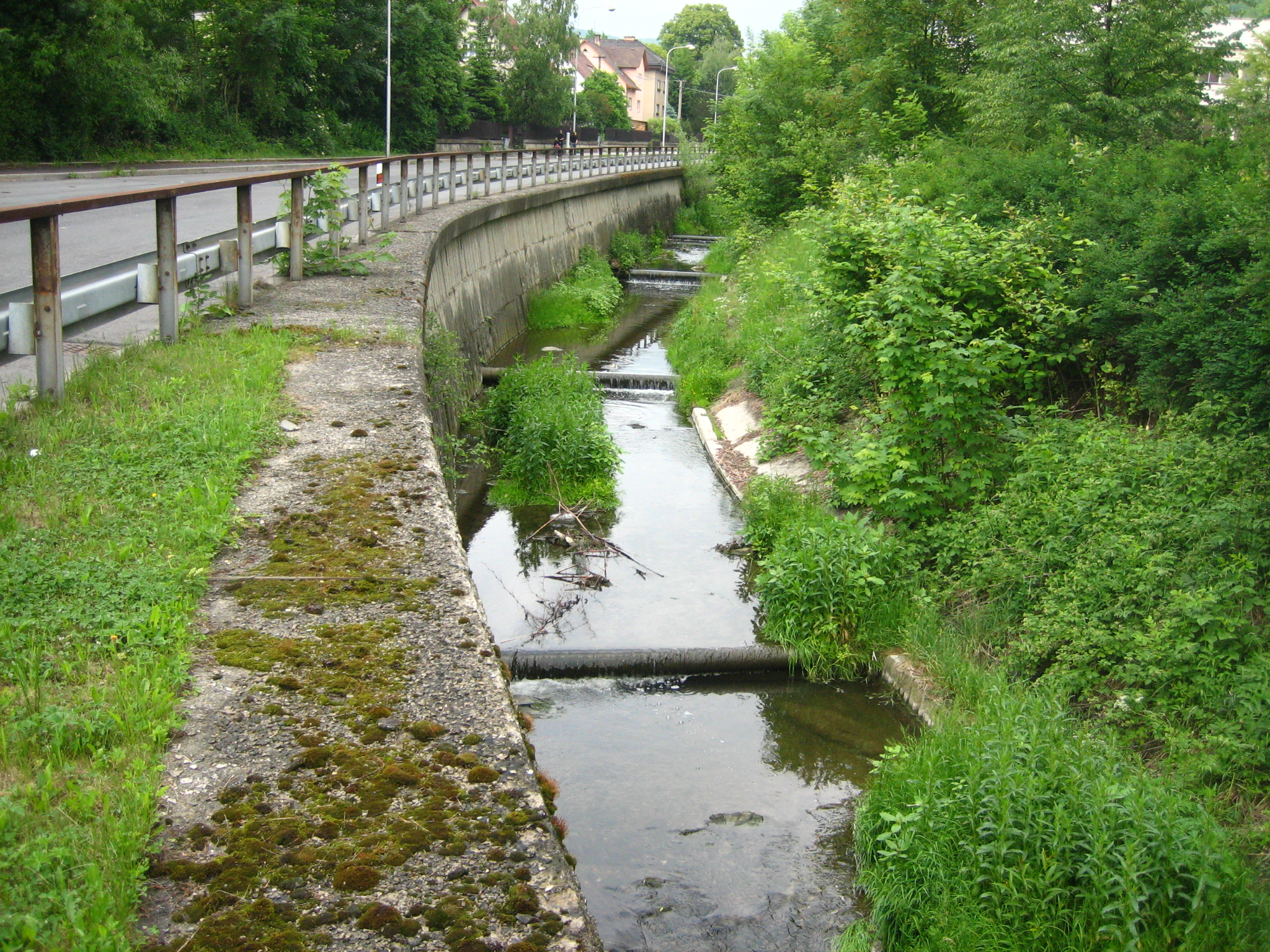 Potok Jasenka v sídlišti Dolní Jasenka na Vsetíně